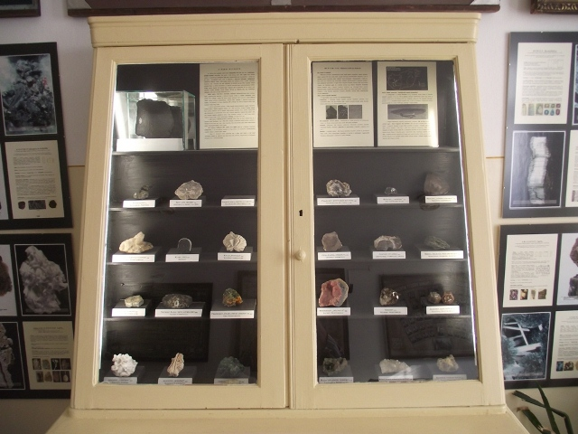 A Szőnyi Pál Ásványgyűjtemény a Debreceni Református Kollégium épületében